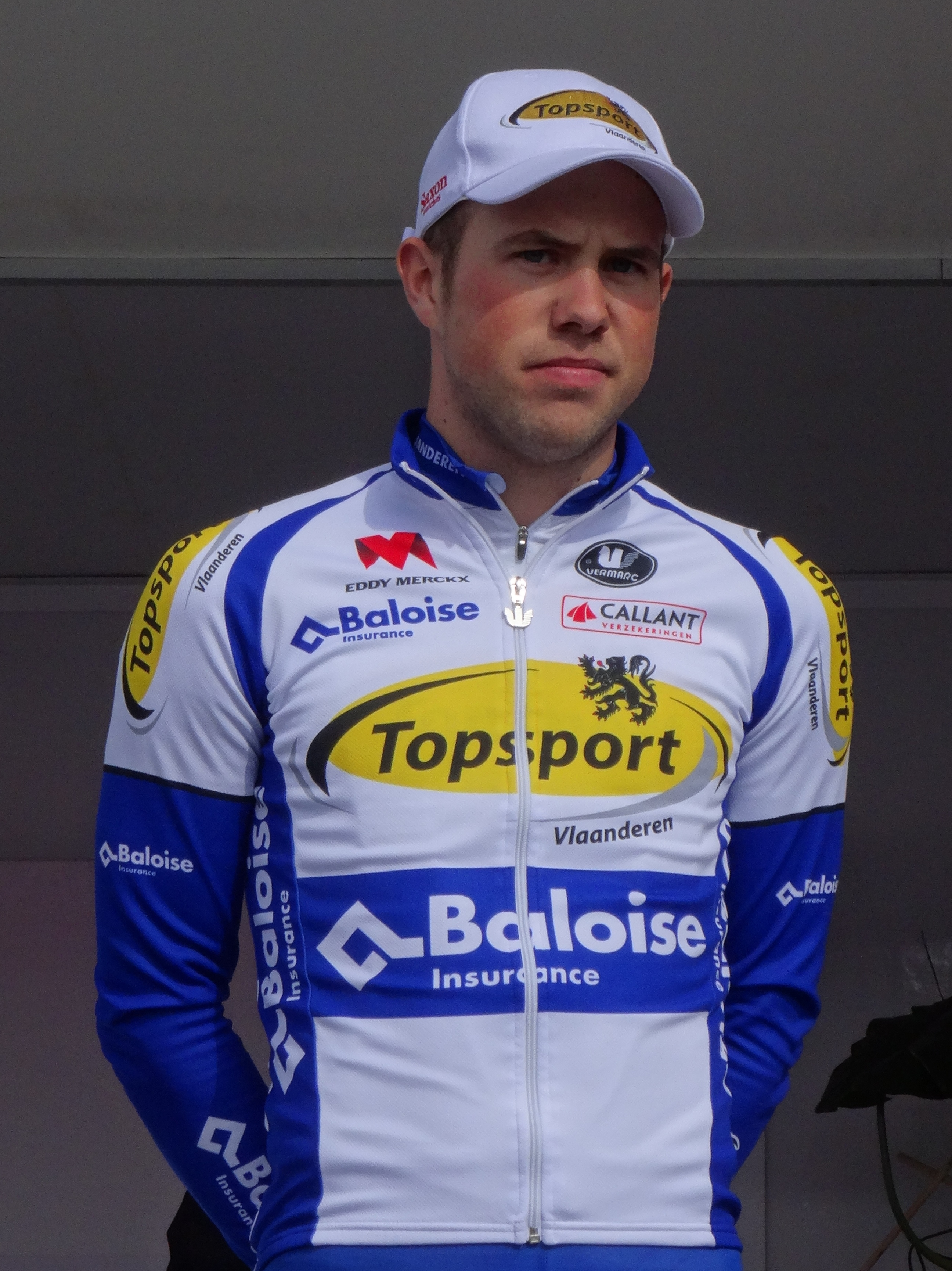 Reportage réalisé le jeudi 17 avril à l'occasion du départ et de l'arrivée du Grand Prix de Denain 2014 à Denain, Nord, Nord-Pas-de-Calais, France.